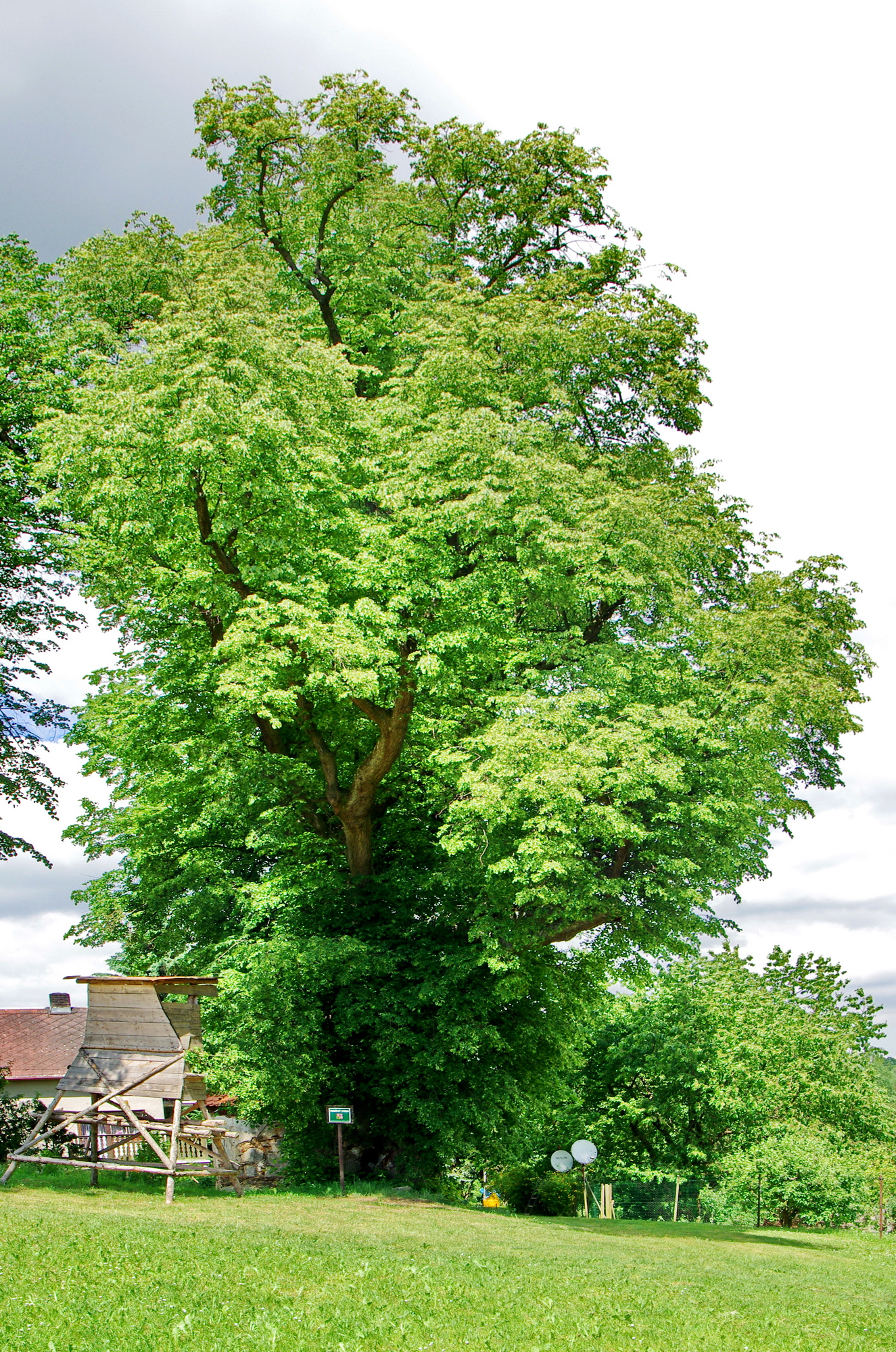 Památný strom - Lípa v Salajně, okres Cheb